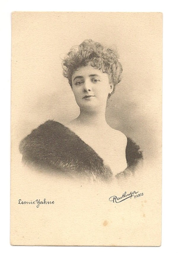 die Schauspielerin Leonie Yahne, eigentlich Marie Léonie Jahn, geboren in Versailles ([1])